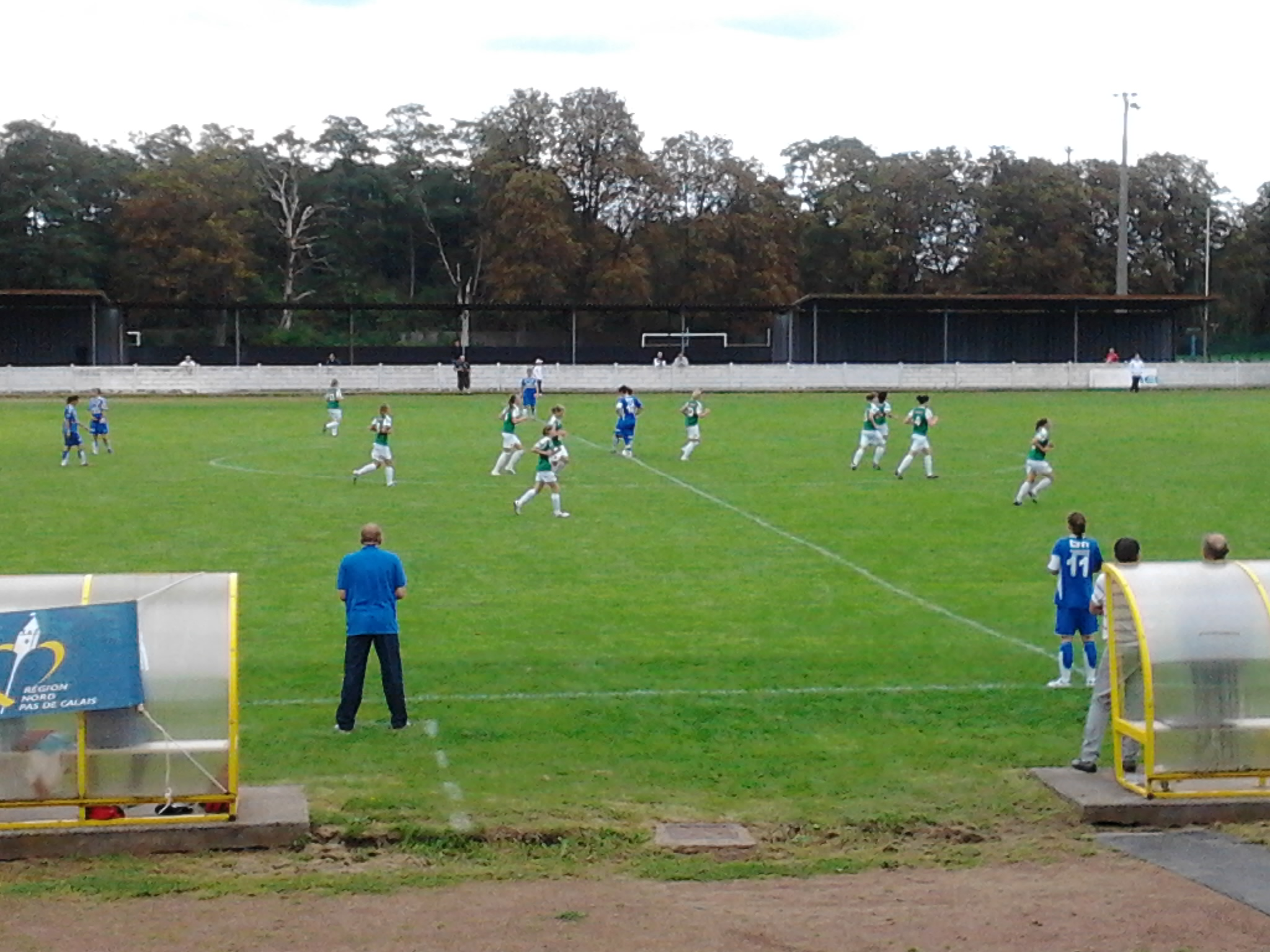 Photo du match FCF Hénin-Beaumont/Yzeure le 4 septembre 2011 après l'égalisation héninoise.